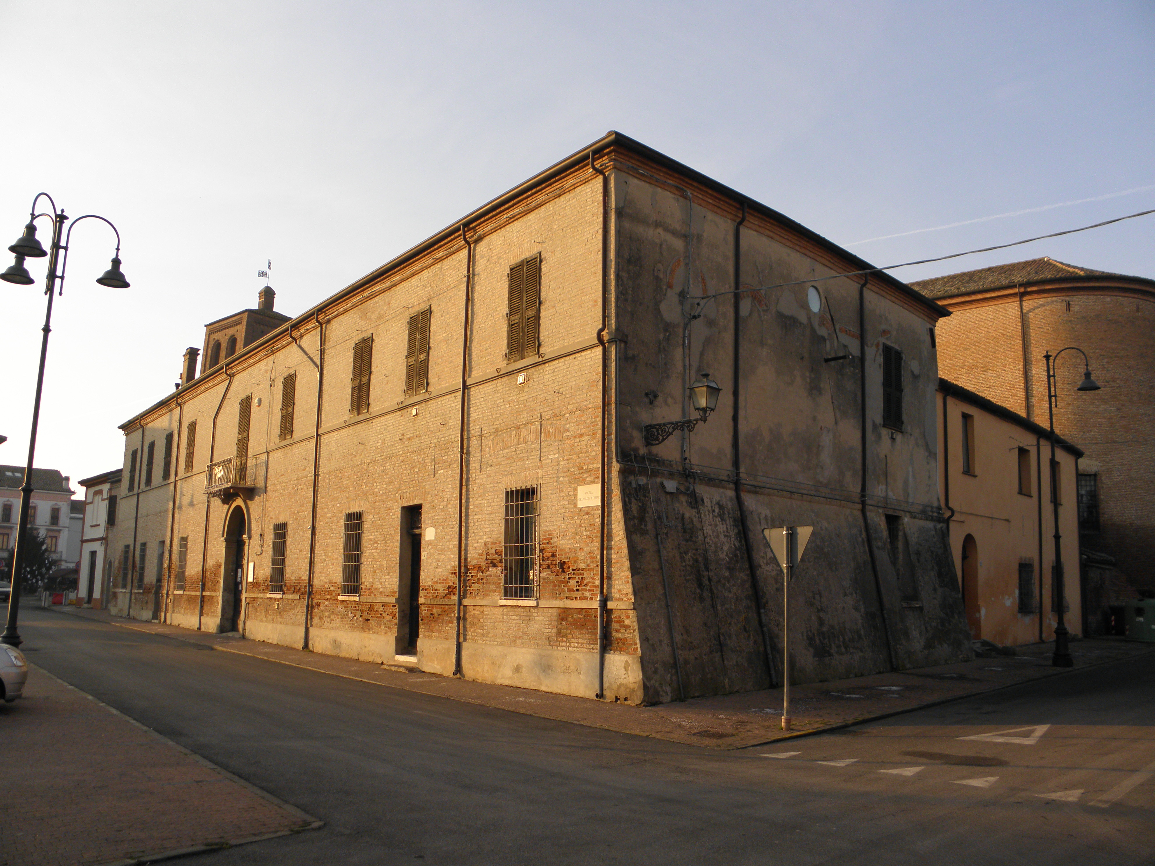 Massa Fiscaglia, già comune autonomo e ora frazione del comune di Fiscaglia: il Palazzo del Vescovo.